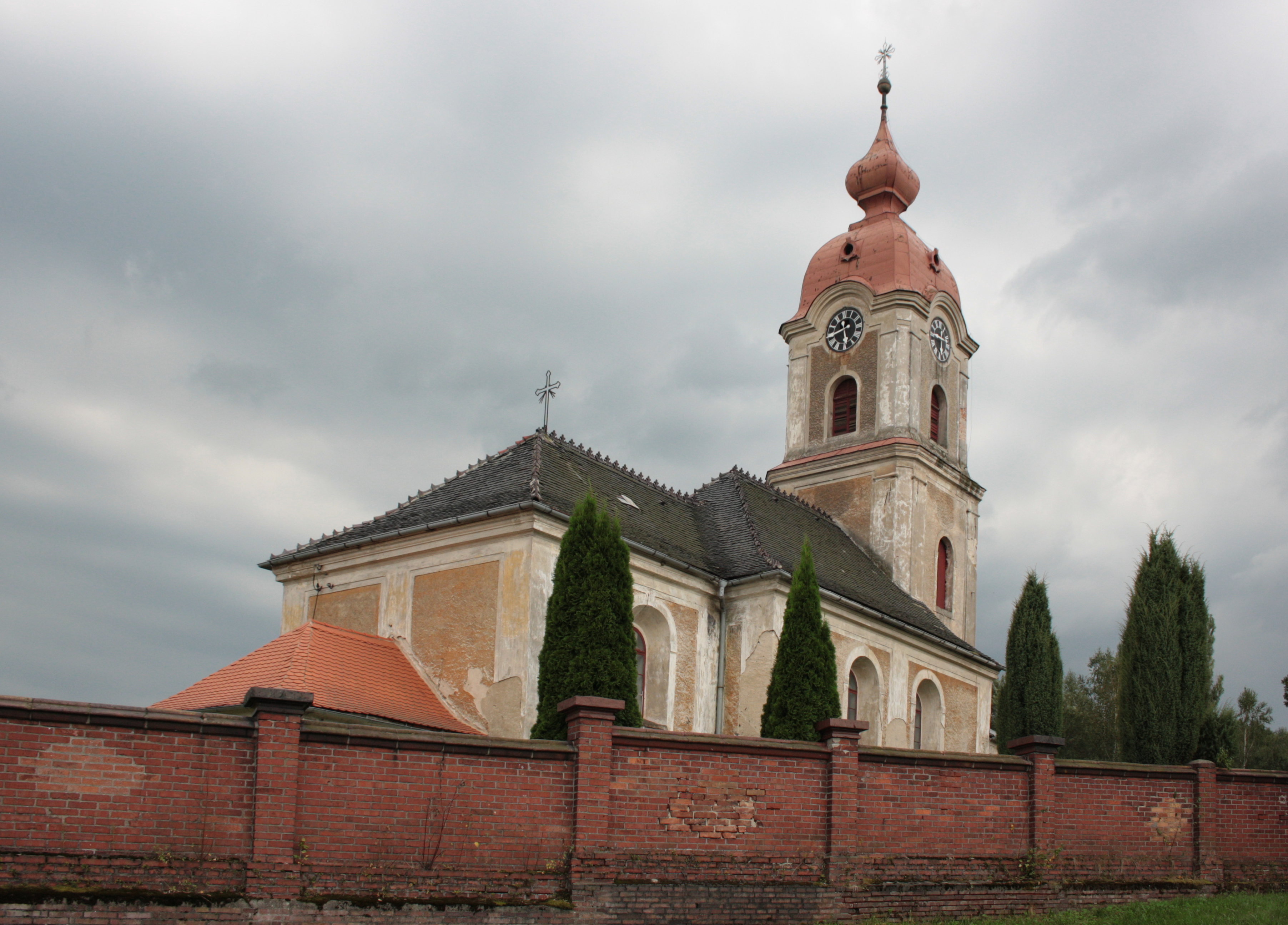 This photograph was taken with a DSLR from WMCZ's Camera grant. Kostel Všech svatých v Kunraticích poblíž Frýdlantu v okrese Liberec.